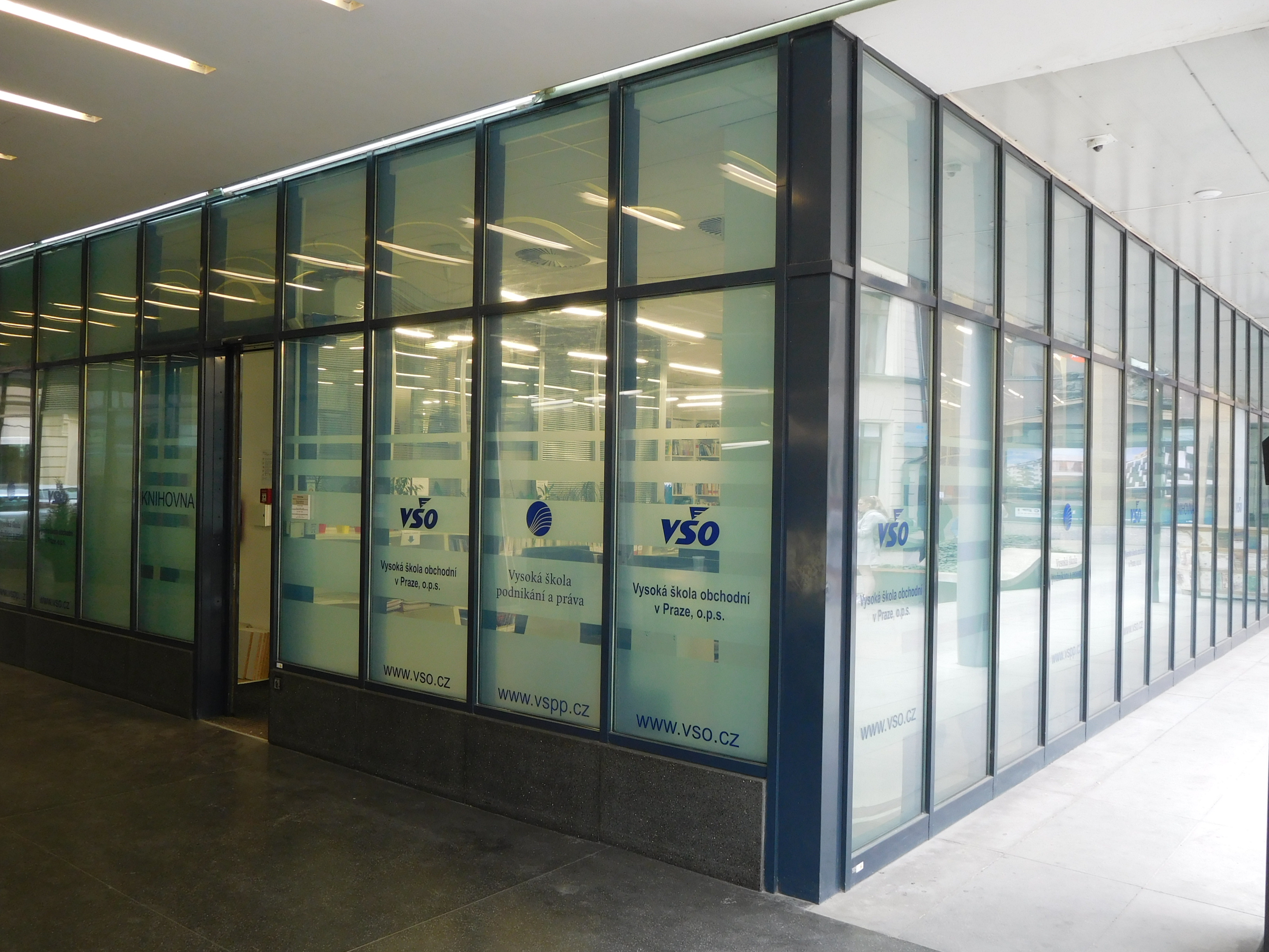 Praha - Nové Město, Spálená 16, knihovna VŠO